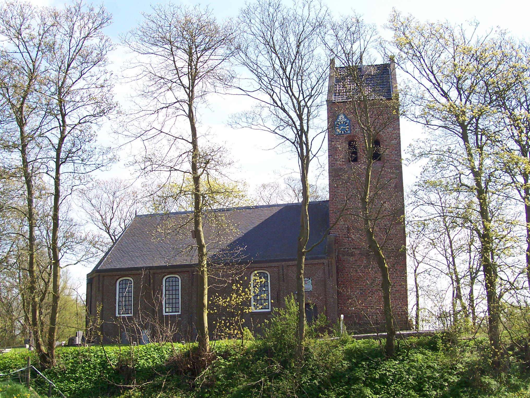 Idaerd, herfoarme tsjerke